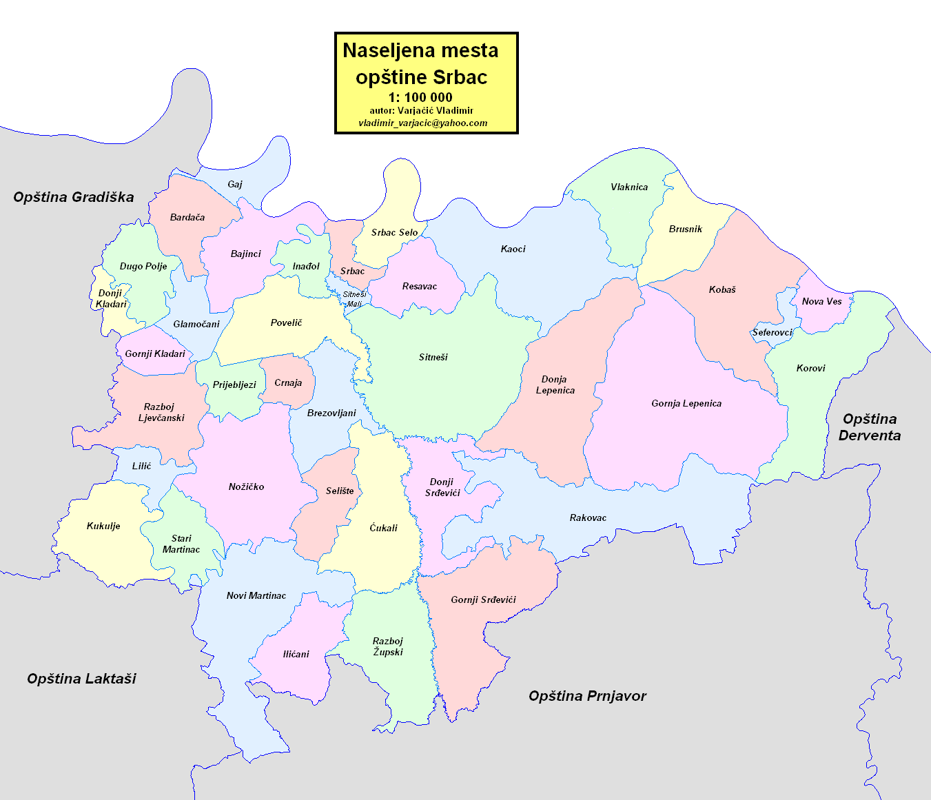 Opština Srbac